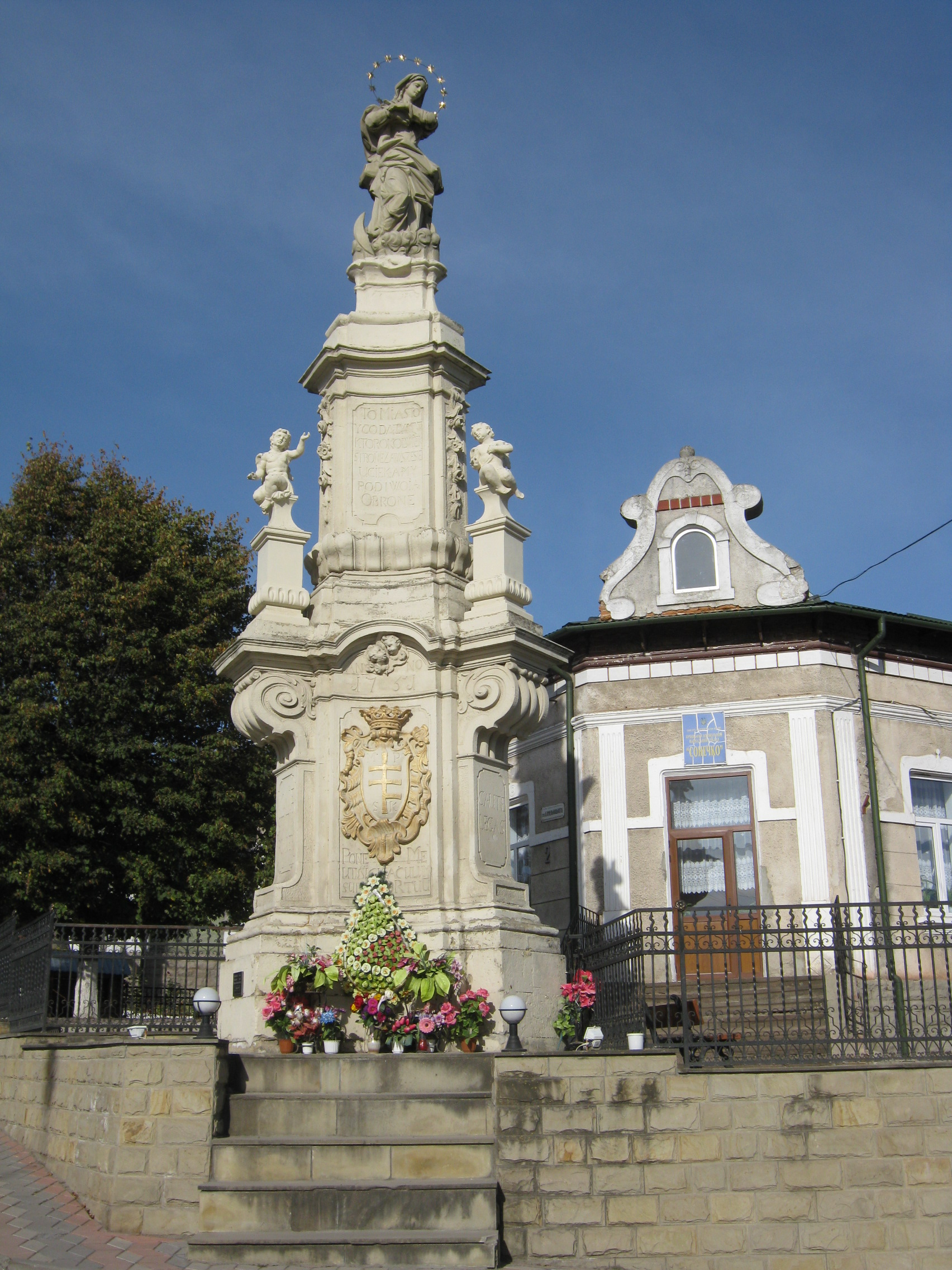 Йоган Георг Пінзель. Придорожний пам'ятник Непорочного Зачаття Пречистої Діви Марії, Нагірянка-Бучач, Тернопільська область